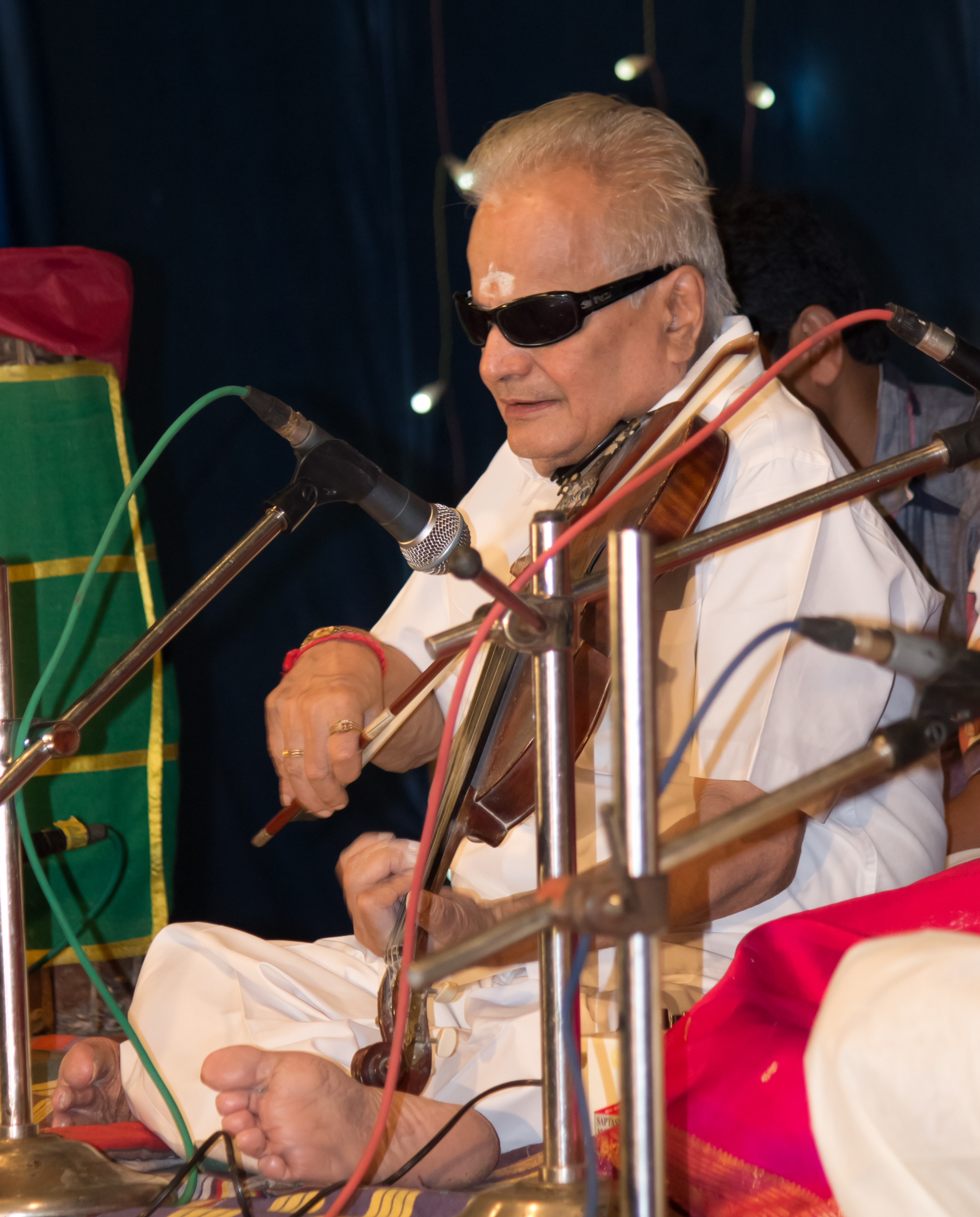 പ്രശസ്ത വയലിനിസ്റ്റാണ് എം. ചന്ദ്രശേഖരൻ. ഇദ്ദേഹം എറണാകുളത്തെ ചങ്ങമ്പുഴ പാർക്കിൽ കച്ചേരി നടത്തുന്നതാണ് ചിത്രത്തിൽ